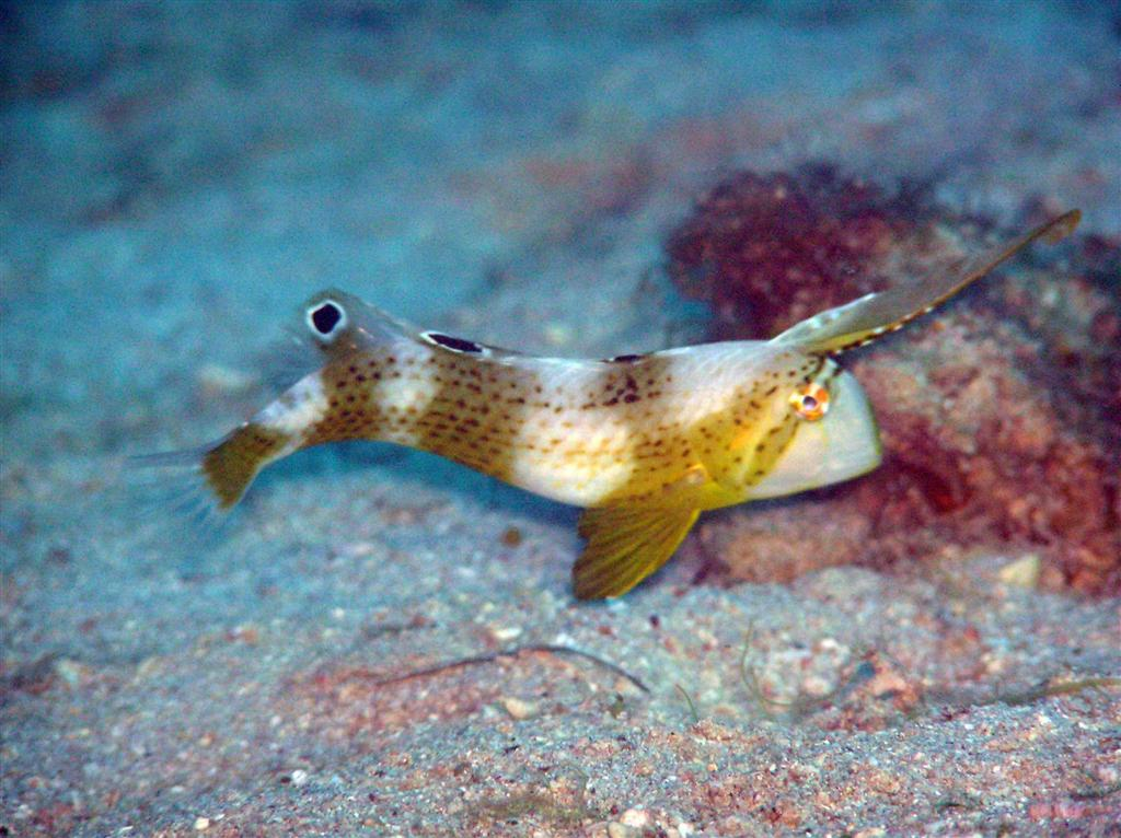 Juvenile Blue Razor Wrasse (Iniistius pavo), Egypt Spring 2005